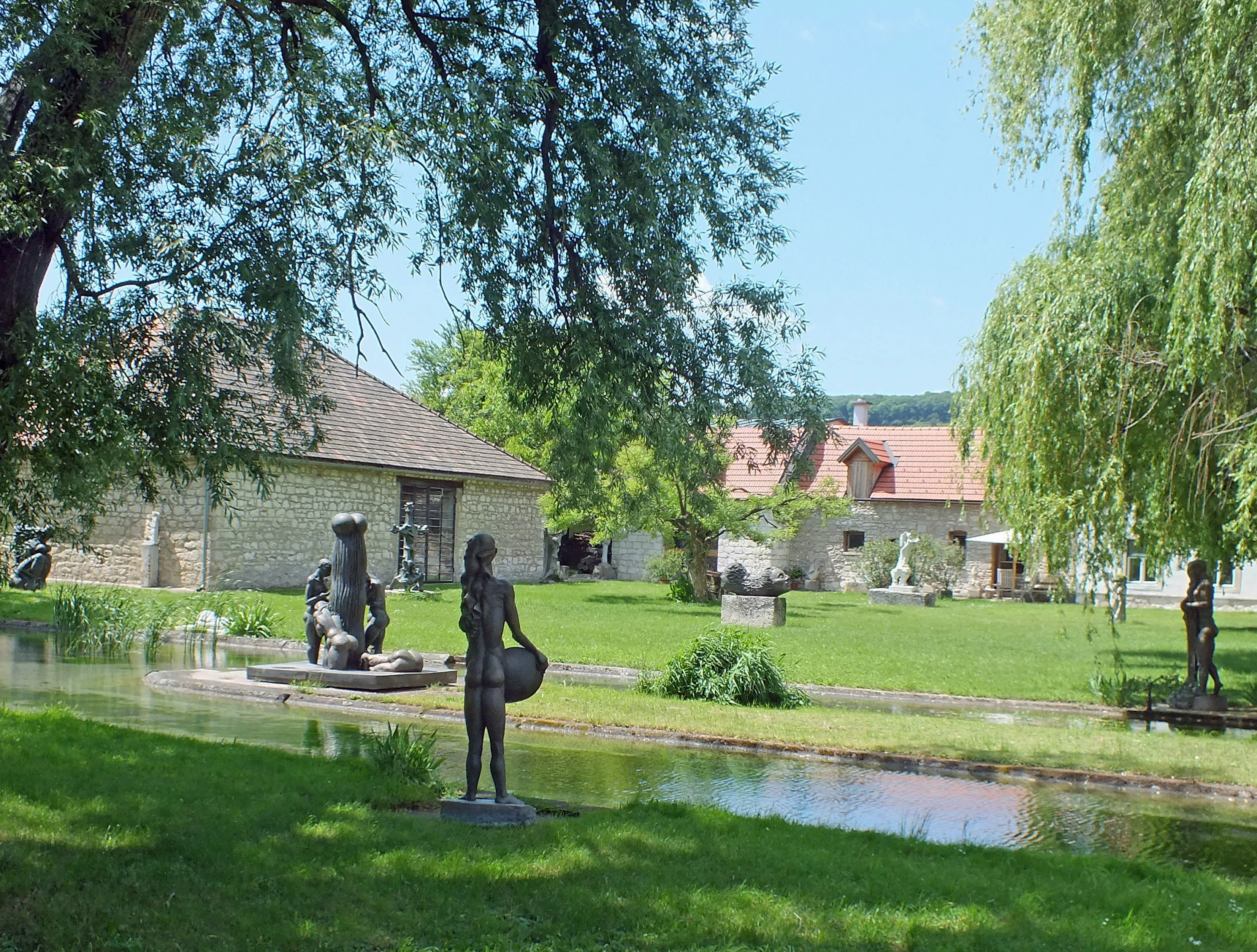 Freilichtmuseum Wander Bertoni in Winden am See (Burgenland, Österreich)